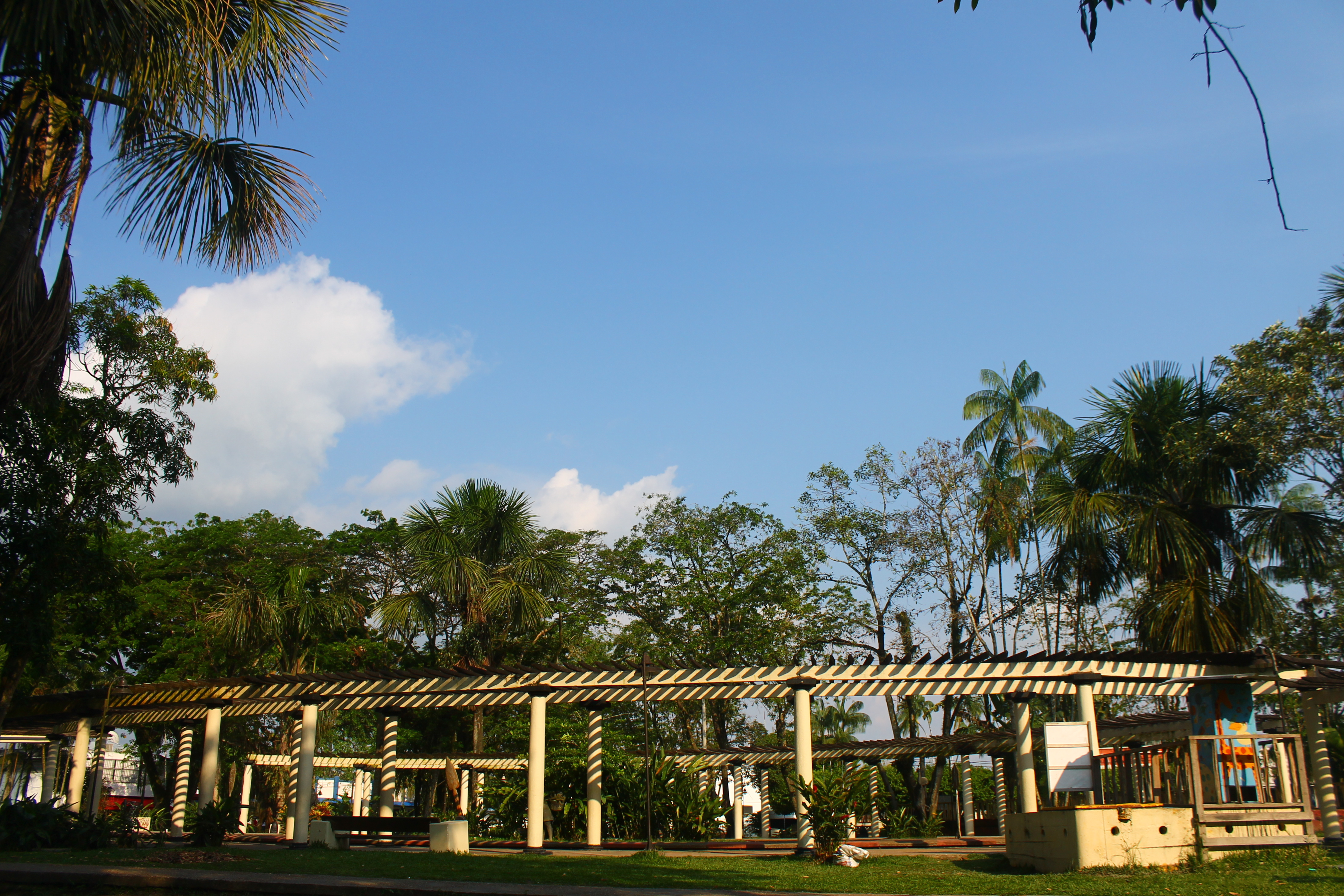 Esta fotografía fue tomada en el municipio colombiano con código 91001.